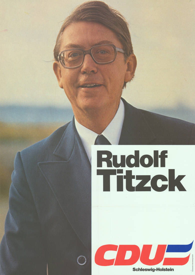 Rudolf Titzck CDU Schleswig-HolsteinAbbildung:FotoPlakatart:Kandidaten-/Personenplakat mit PorträtAuftraggeber:Verantw.: CDU Schleswig-HolsteinObjekt-Signatur:10-012 : 406Bestand:Landtagswahlplakate Schleswig-Holstein (10-012)GliederungBestand10-18:Landtagswahlplakate Schleswig-Holstein (10-012) » Landtagswahl am 29.4.1979 » AnkündigungsplakateLizenz:KAS/ACDP 10-012 : 406 CC-BY-SA 3.0 DE